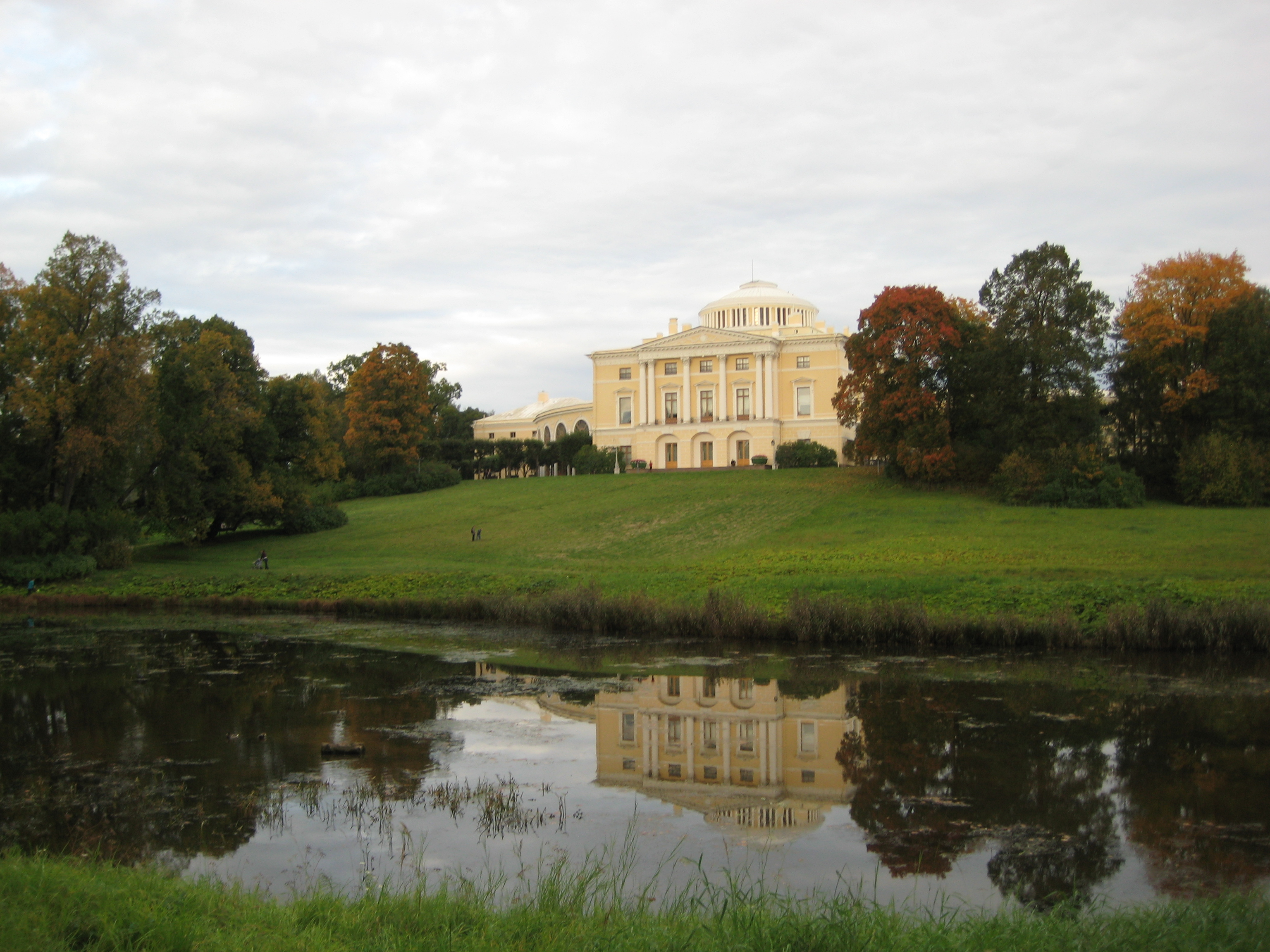 Павловск. Большой дворец